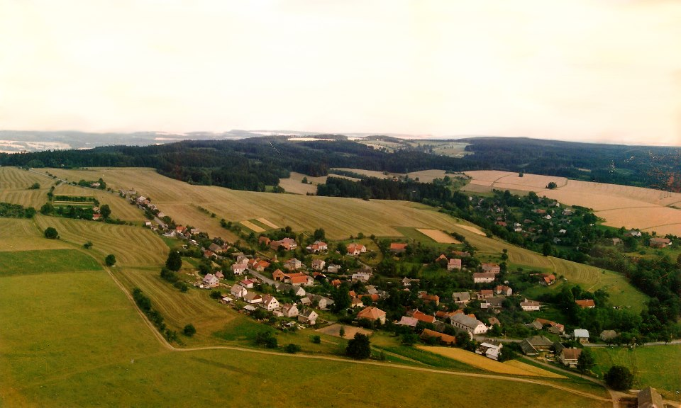 Letecký pohled na Zhoř